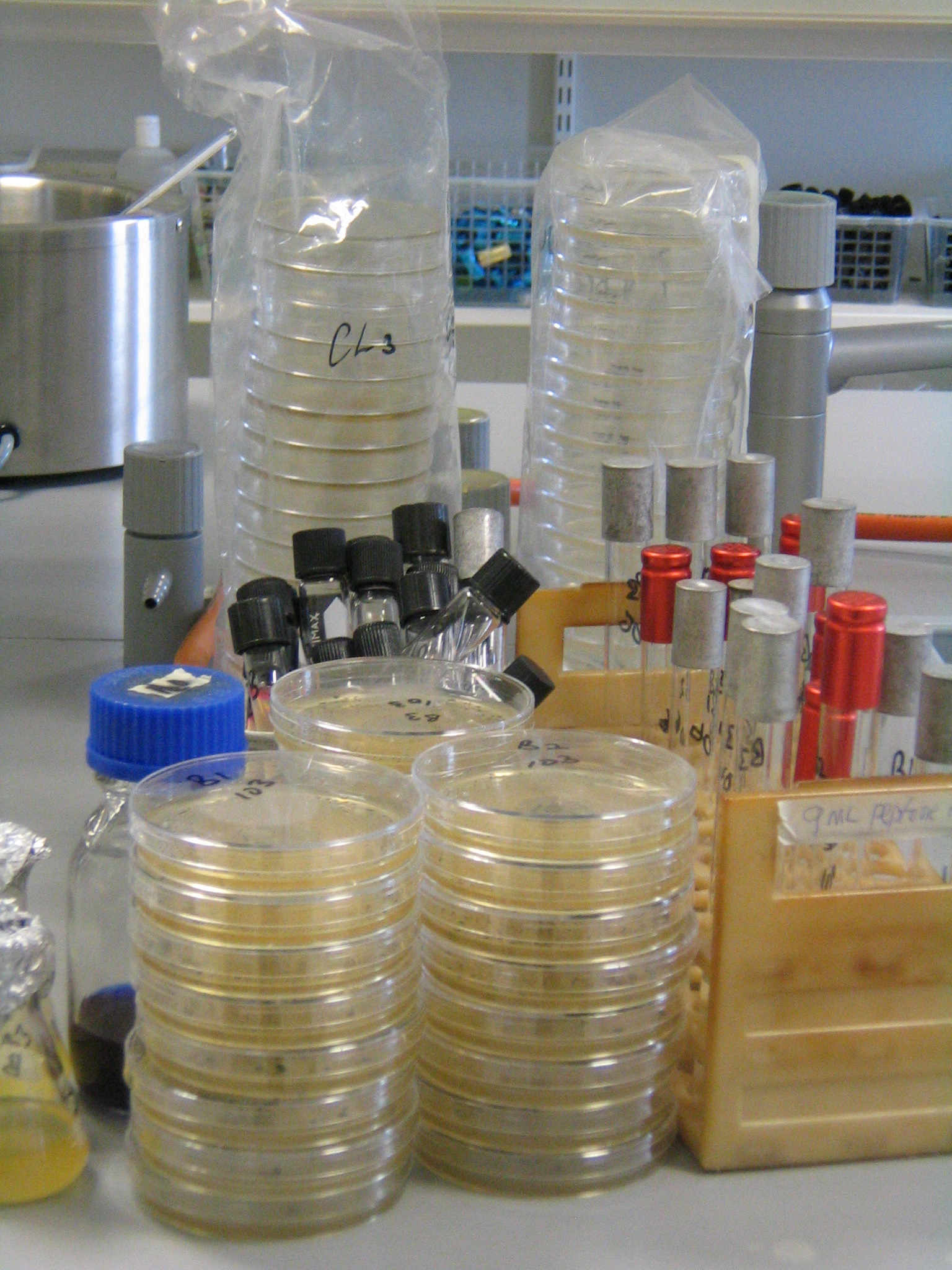 Setup af labbi í UNAK